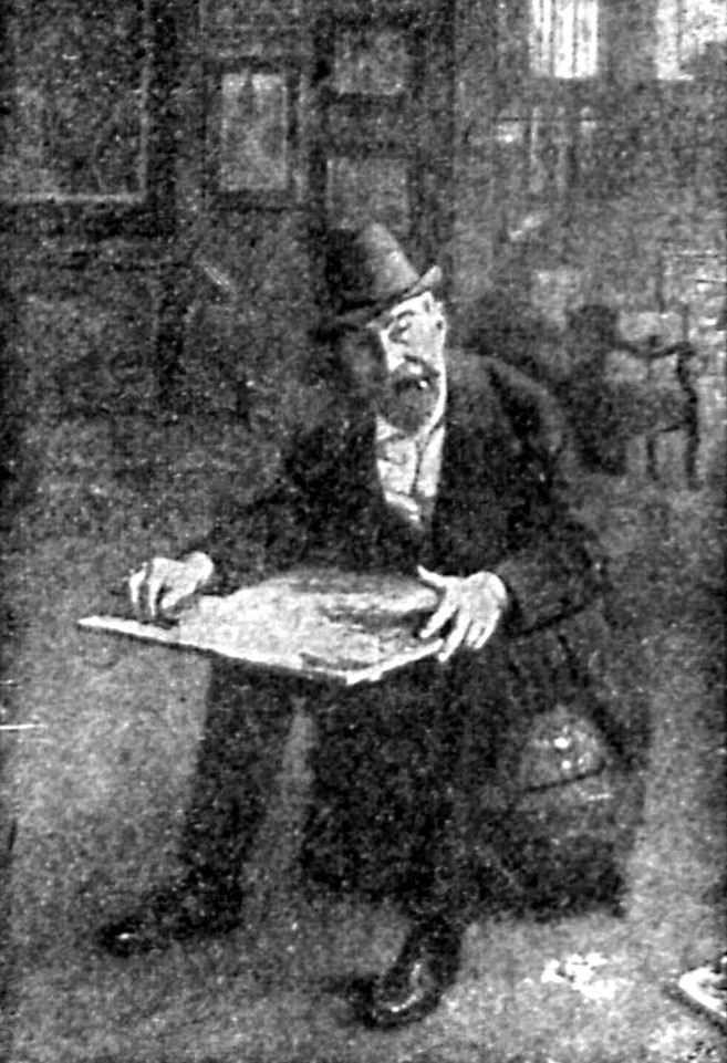 Prof. Gotthardt Kuehl